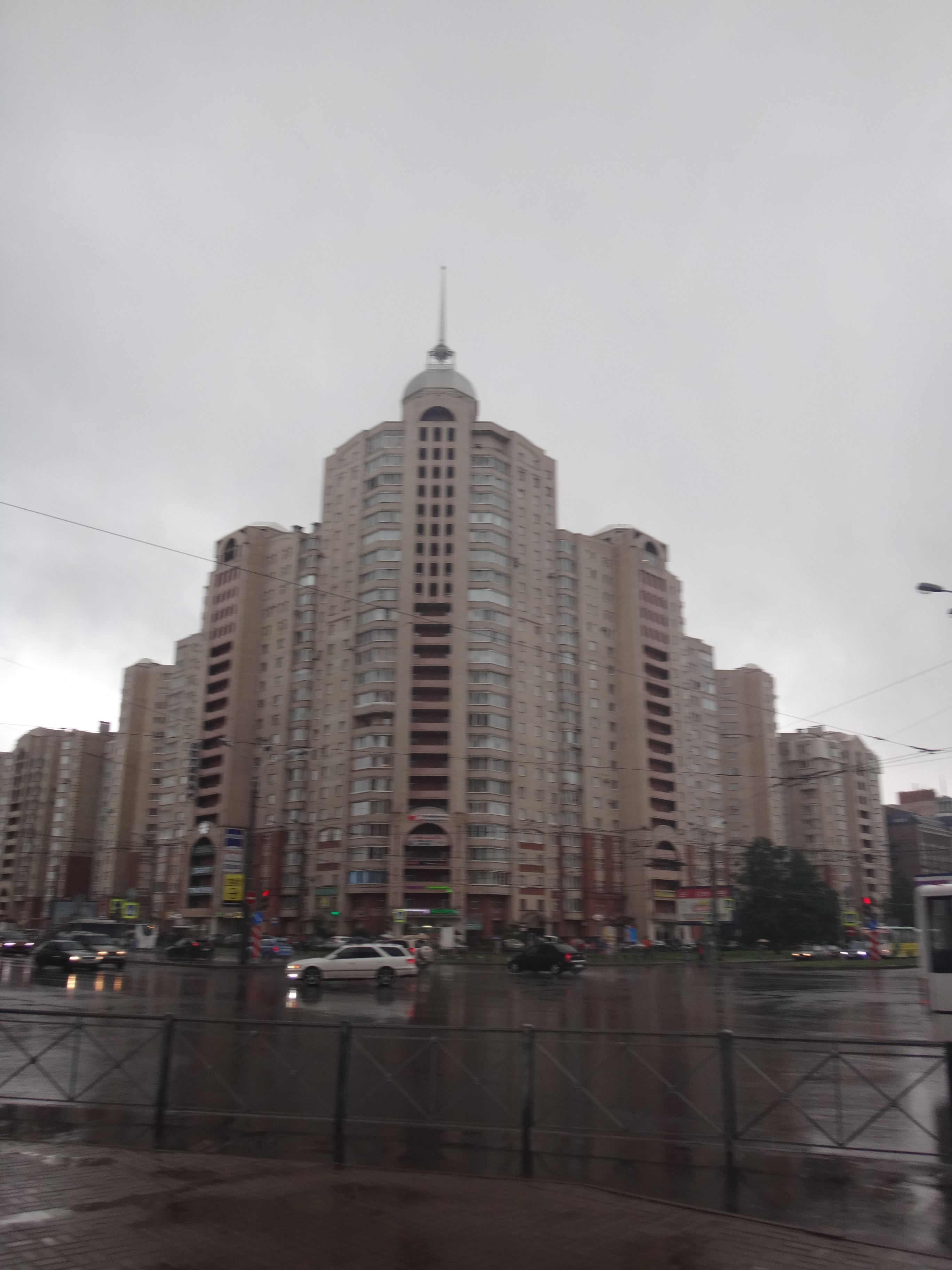 Высотное здание на Богатырском пр., 2. Расположено точно на 60-й параллели